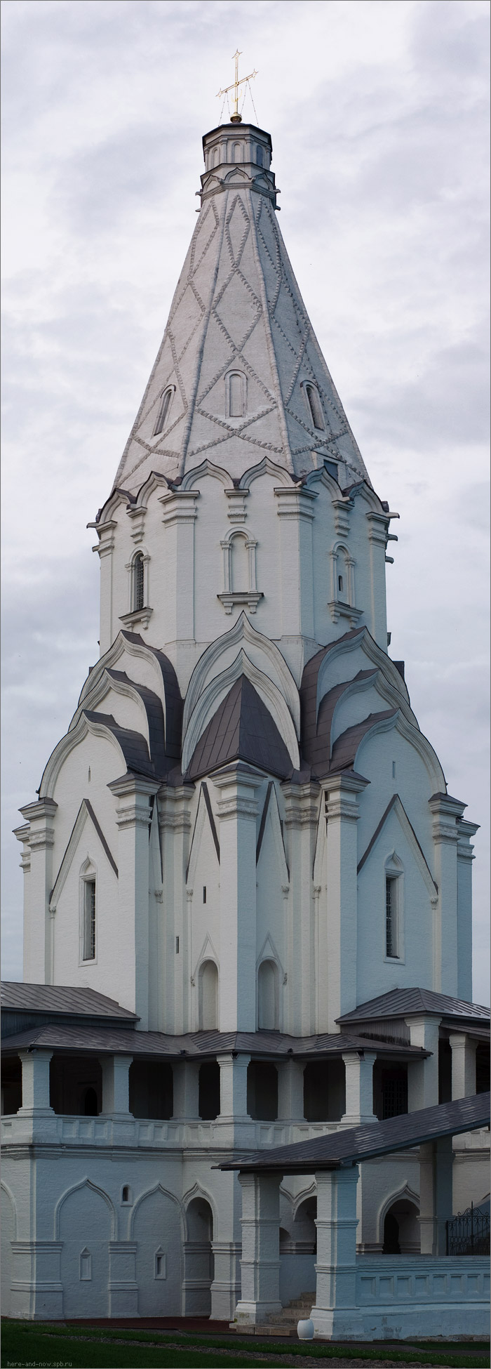 Храм Вознесения в Коломенском, общий вид